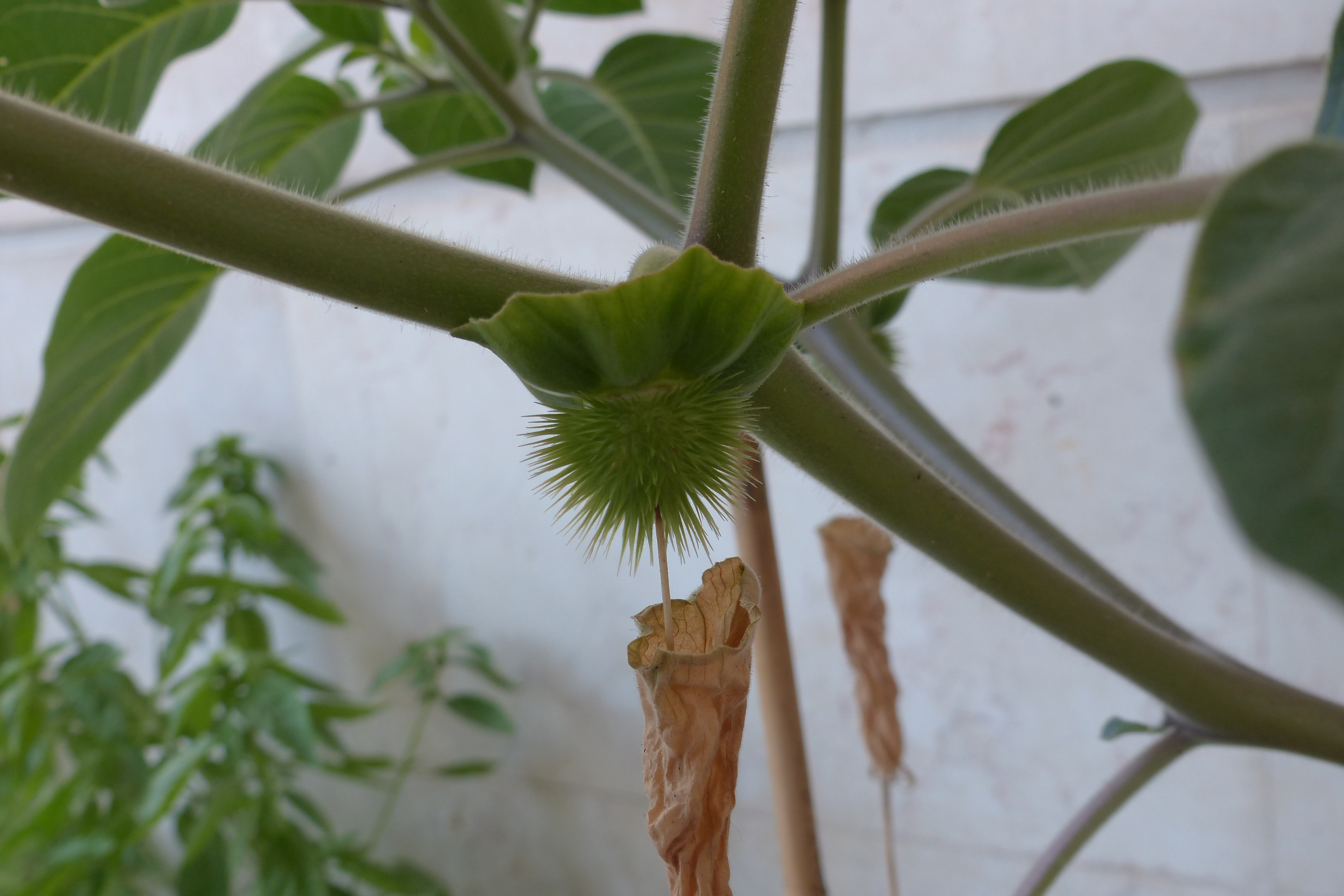 פרי הדטורה צץ מתוך הפרח שהגן עליו